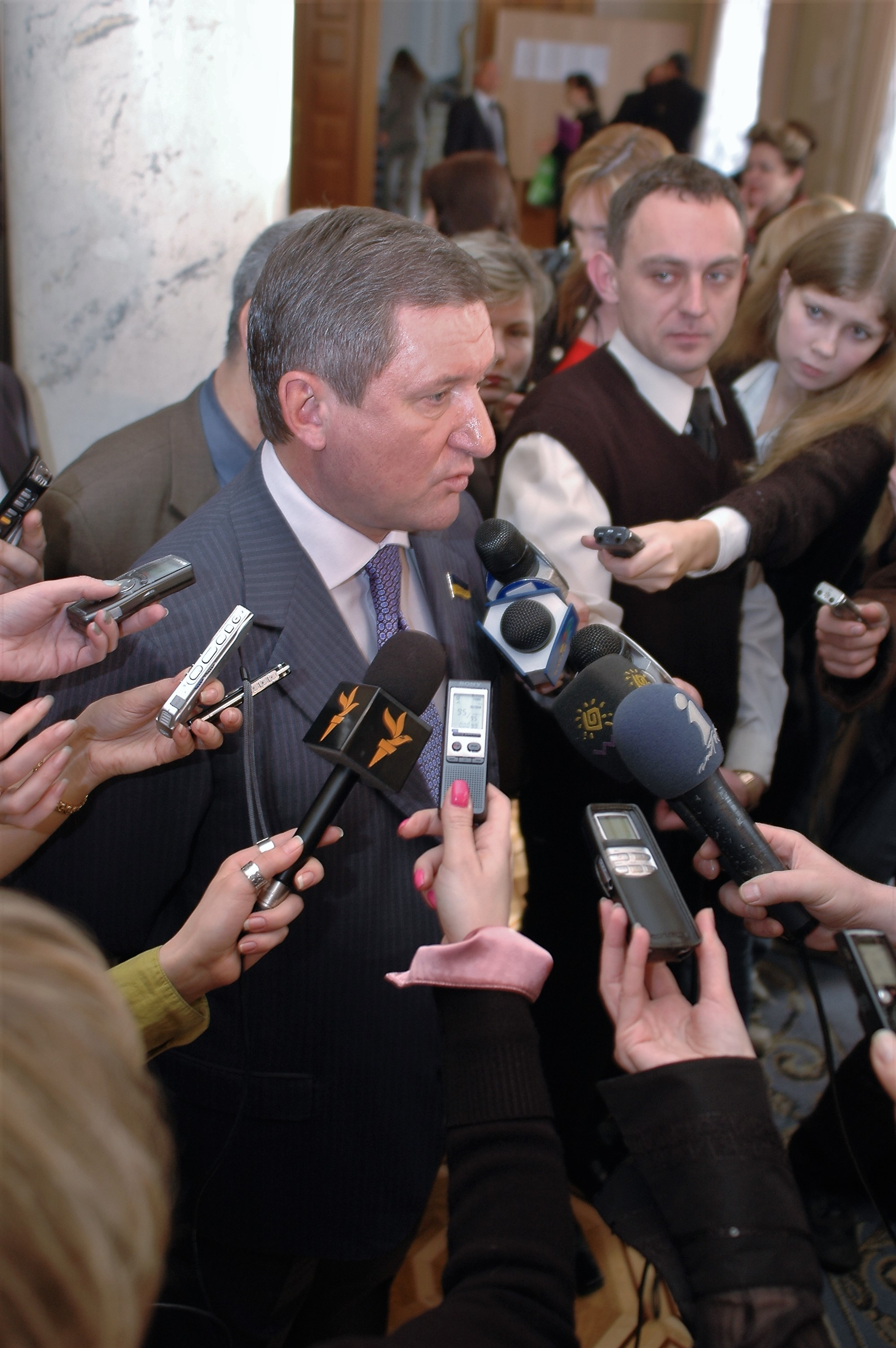 Eugeni Kushnarev